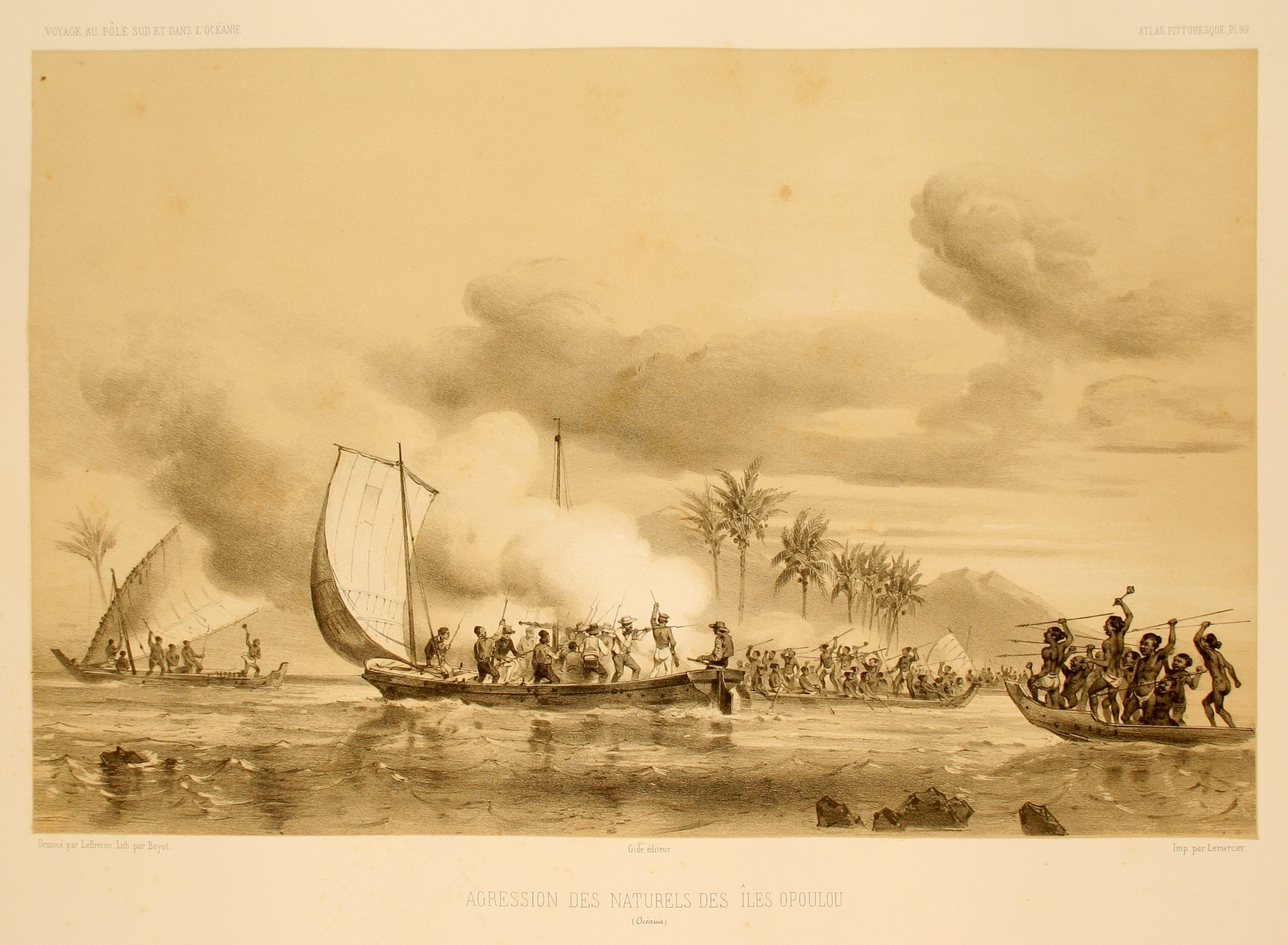 Agression des naturels de l'île Rook (c'est par erreur que cette planche porte : Agression des naturels de l'île Opoulou). Atlas pittoresque, planche 99